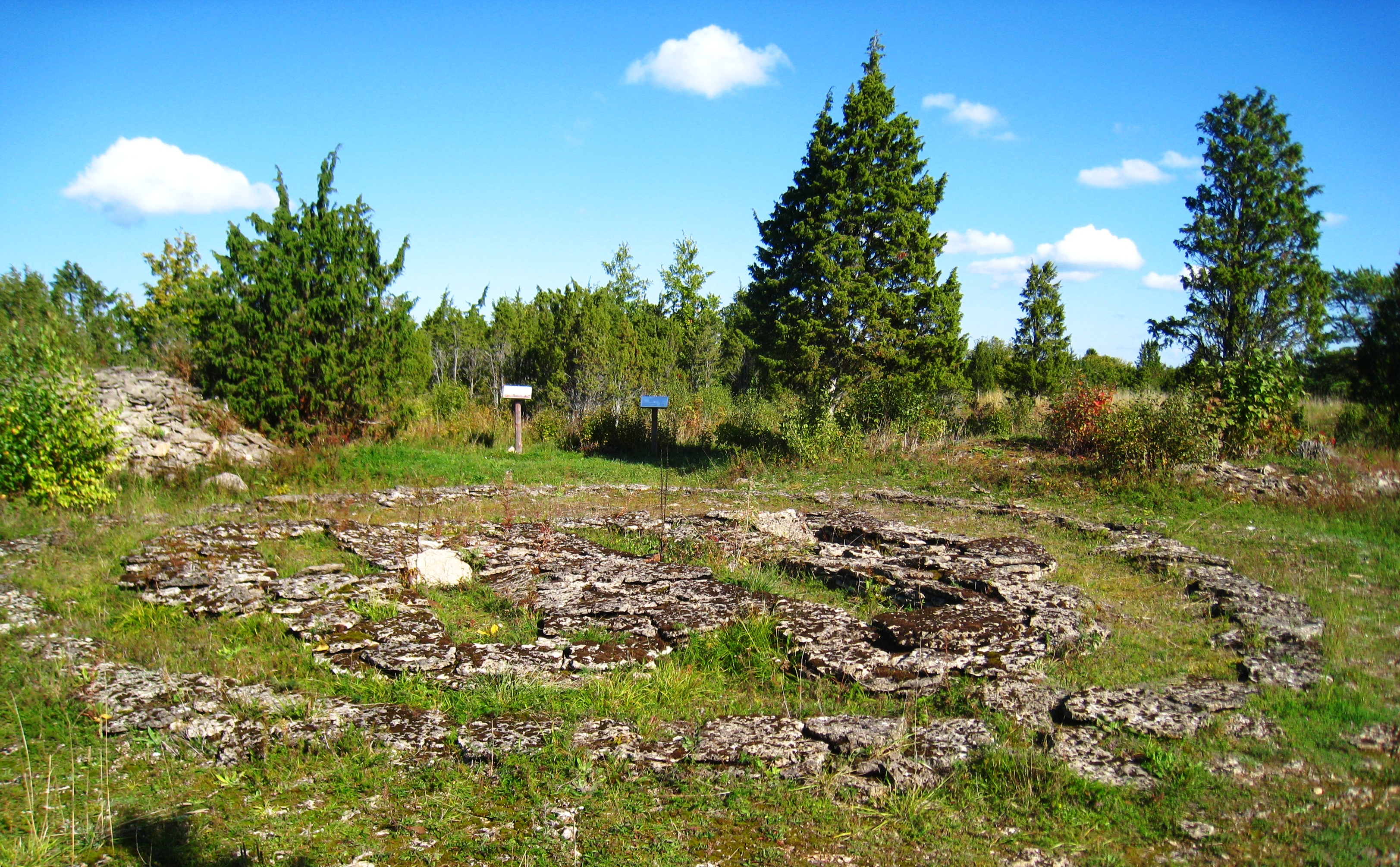 Hundikangrud